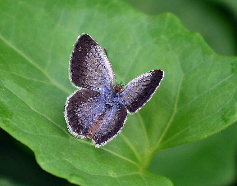 Pale Grass Blue Psuedozizeeria maha in Kolkata, West Bengal, India.